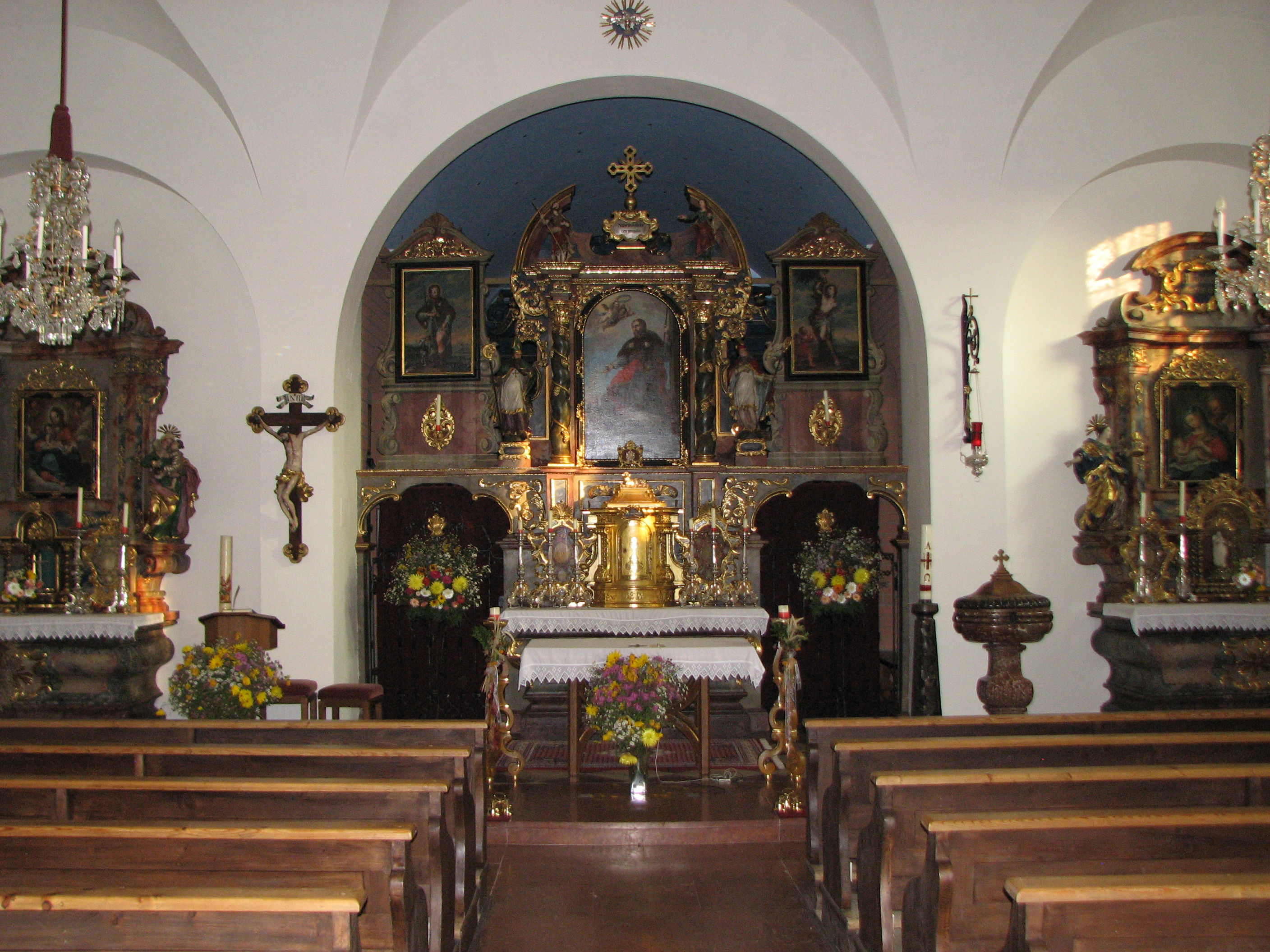 Wallfahrtskirche hl. Jakob der Ältere